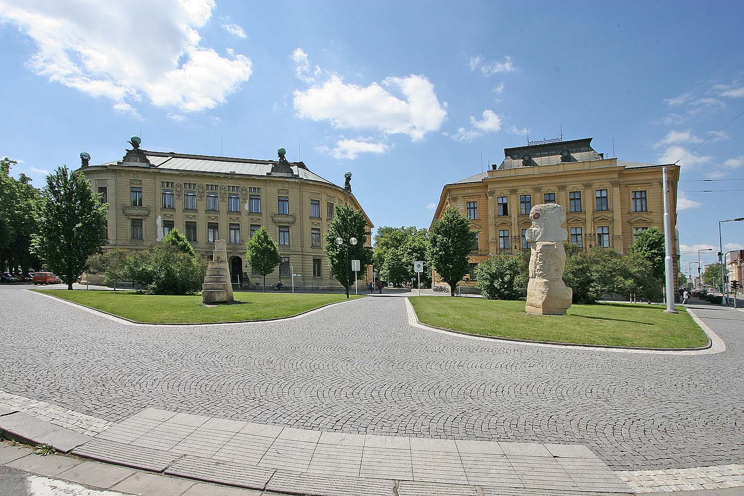 Hradec Králové - budovy University na náměstí Svobody